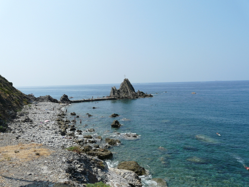 Lo scoglio dell'Asseu presso la frazione di Riva Trigoso, Sestri Levante, Liguria, Italia